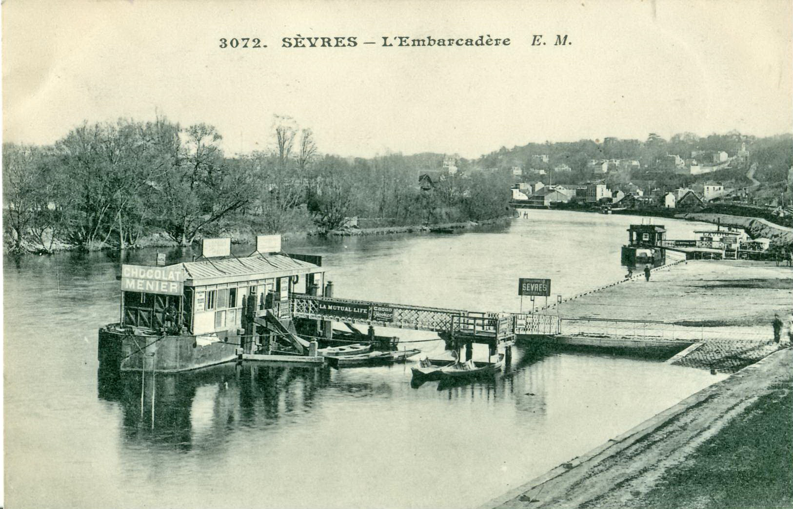 Carte postale ancienne éditée par EM, N°3072 SÈVRES : l'Embarcadaire